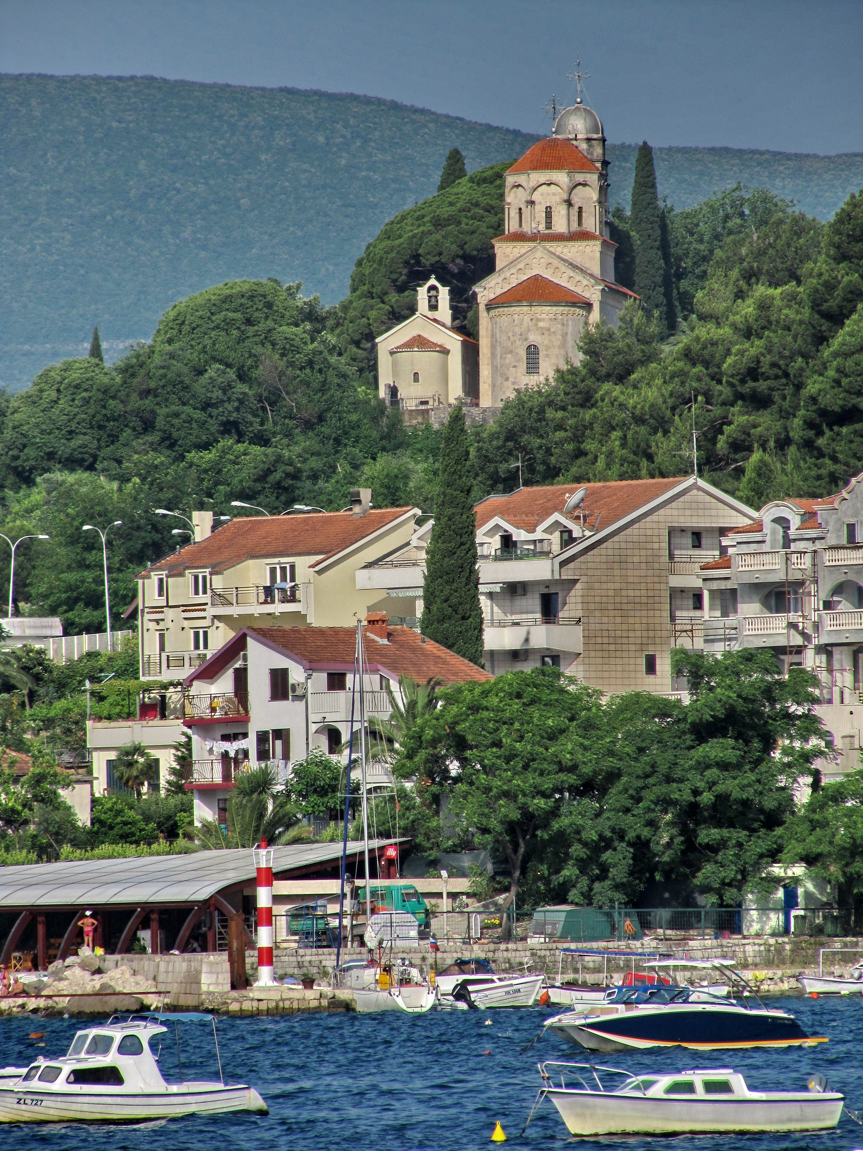 Meljine, Montenegro